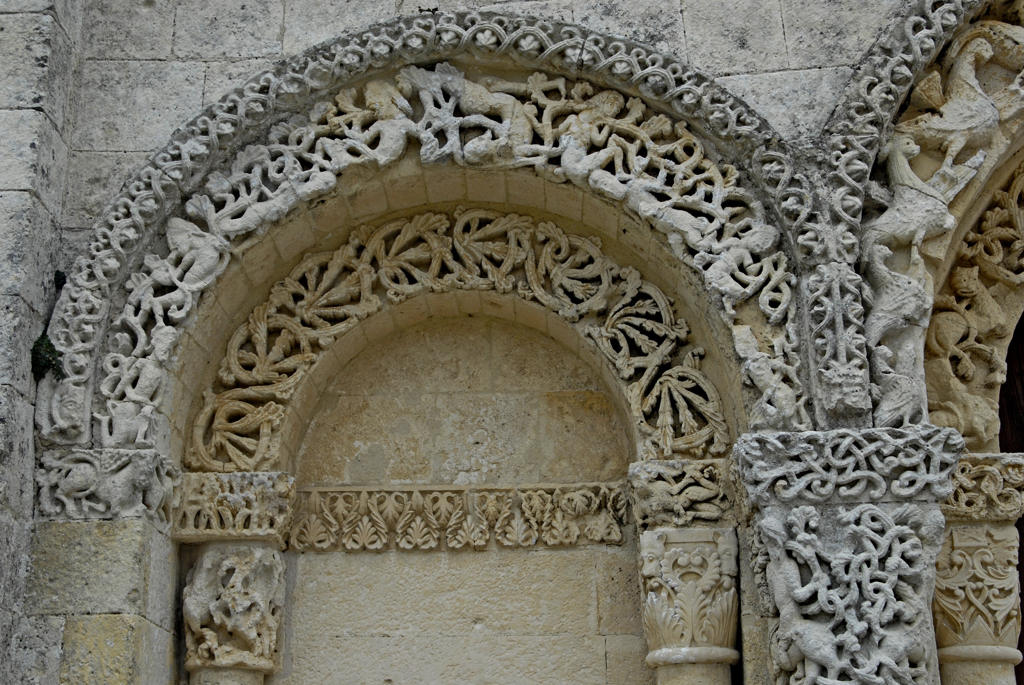 Notre-Dame Corme-Écluse,linkes Scheinportal